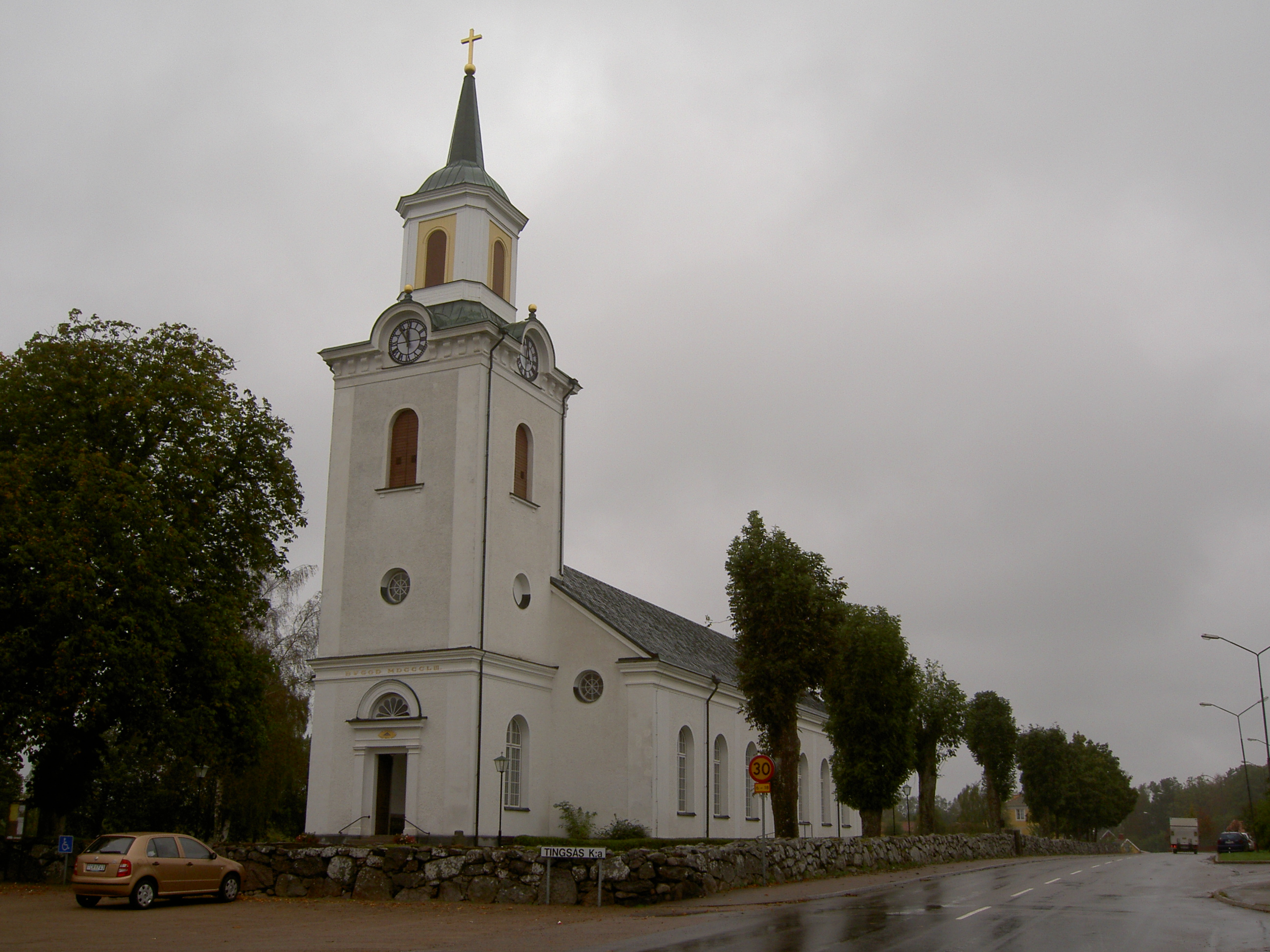 Tingsås kyrka